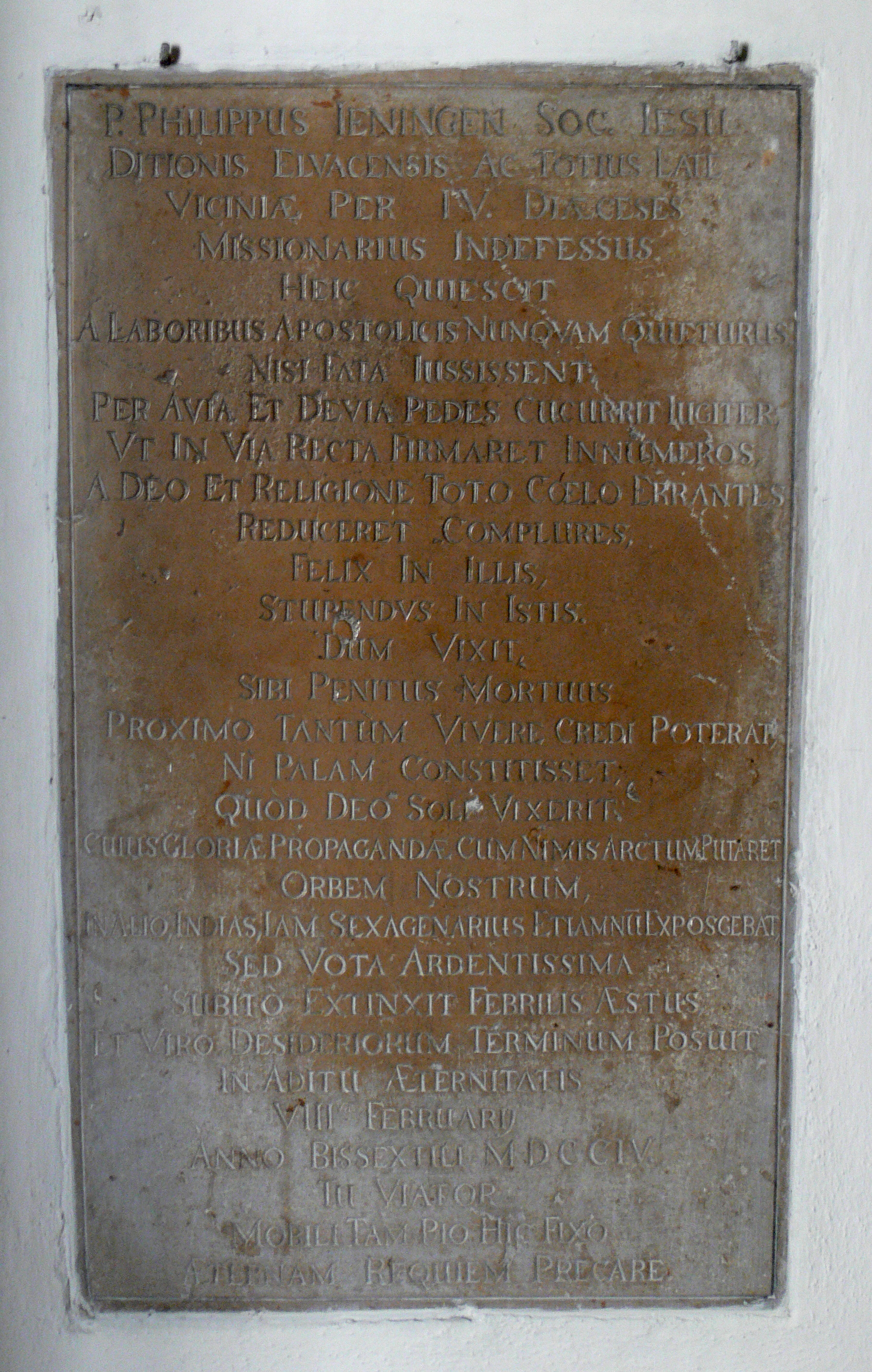 Stiftsbasilika St. Vitus, Ellwangen (Jagst) Epitaph Philipp Jeningen